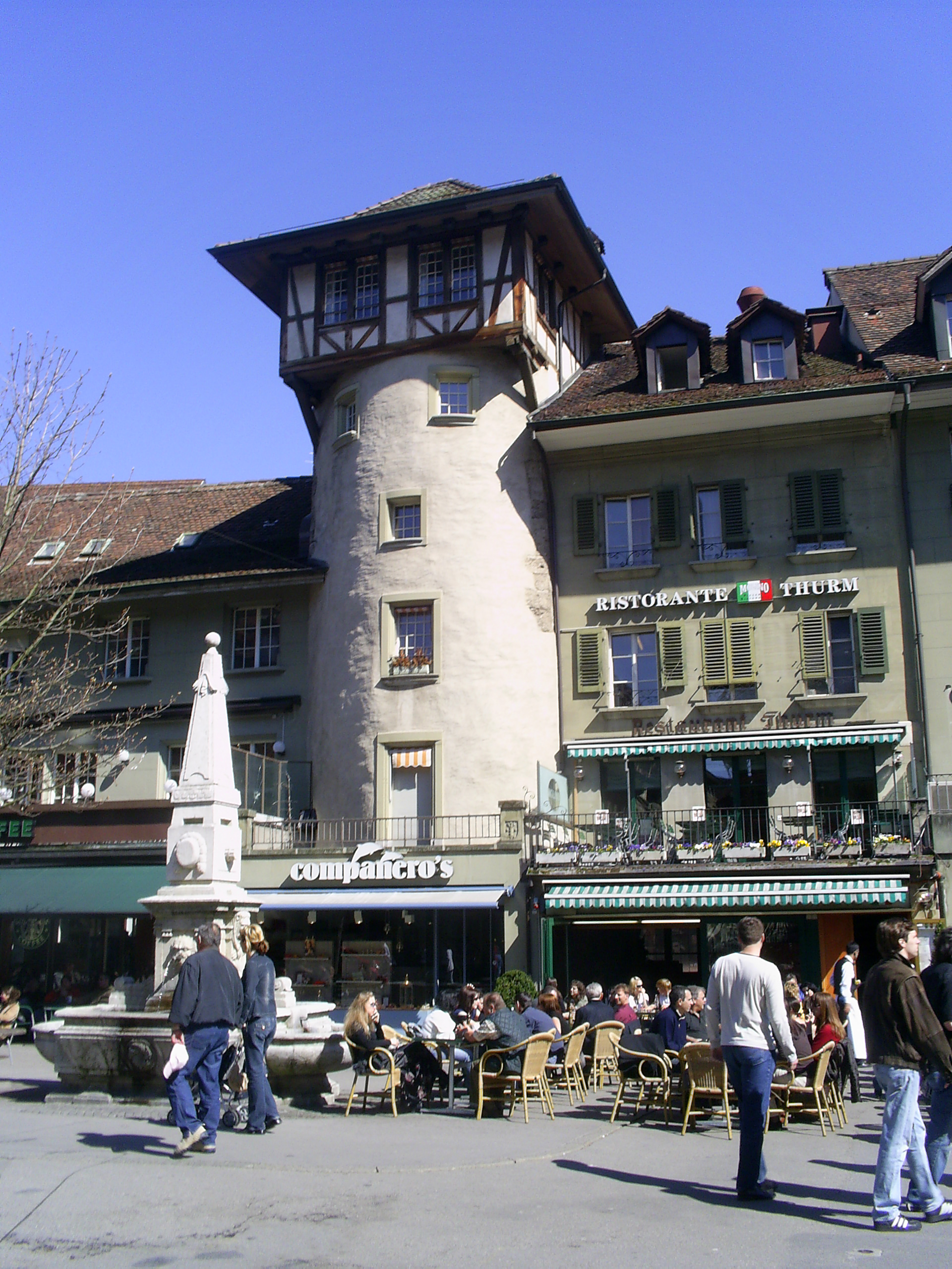 Torre del Holandés en Berna